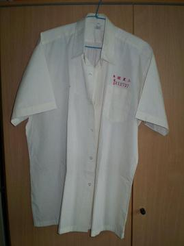 國立桃園高級農工職業學校日間部學生夏季制服照片（男女制服上衣皆相同）。